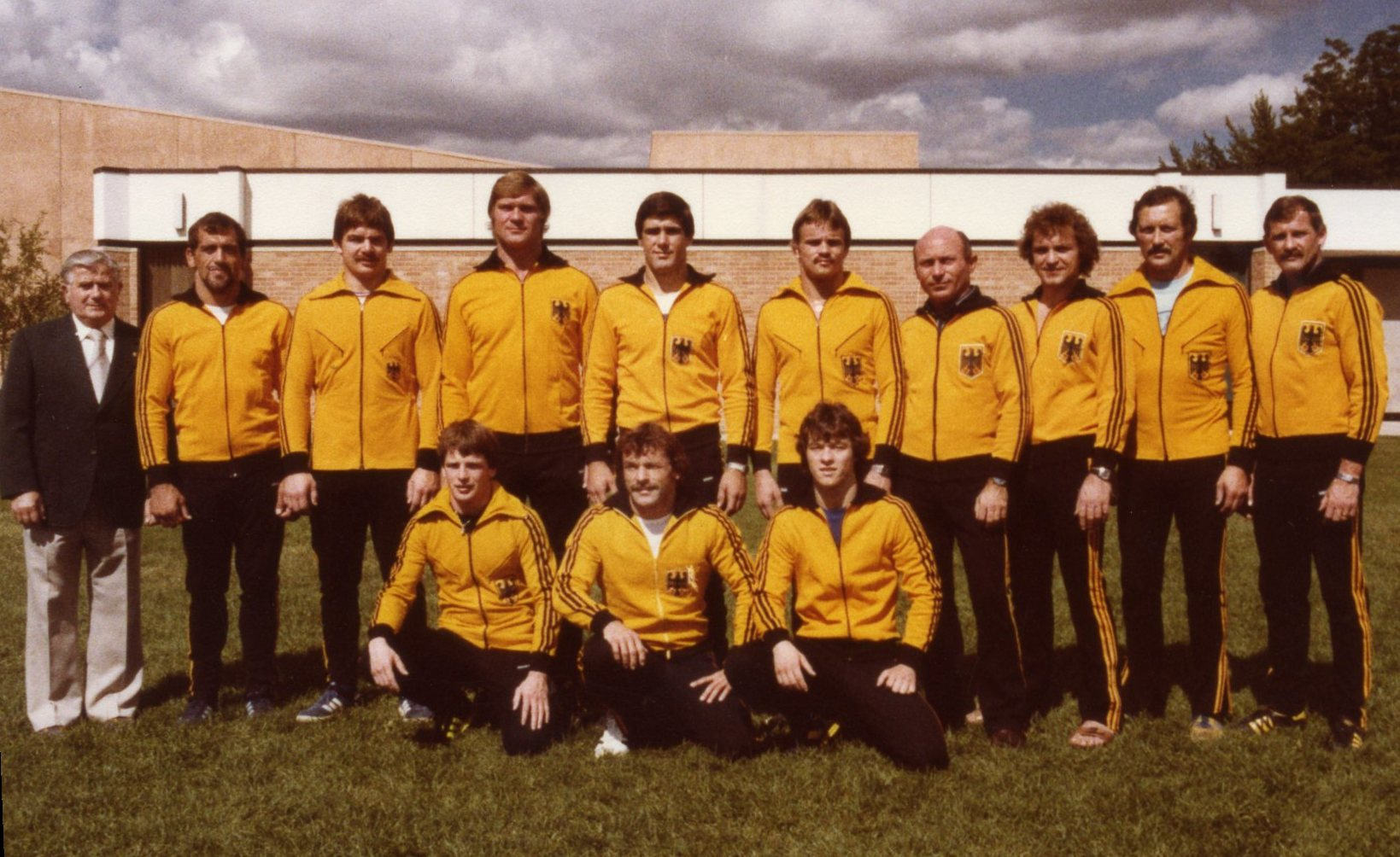 Deutsche Nationalmannschaft (Freistil) 1978. Gerhard Sattel (hintere Reihe, fünfter von rechts), Heinz Ostermann (hintere Reihe, erster von rechts)